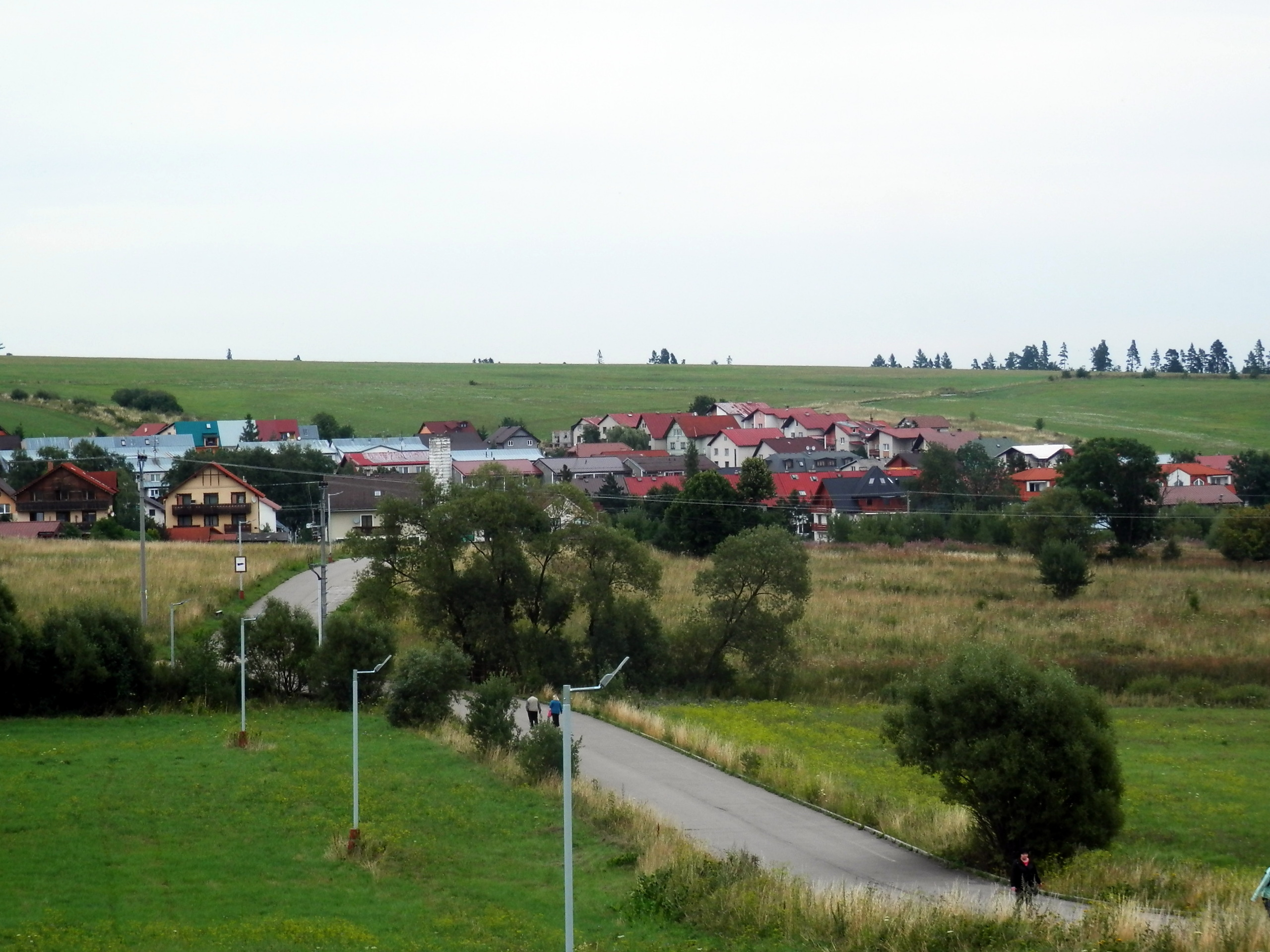 Obec Nová Lesná, pohľad zo železničnej stanice.